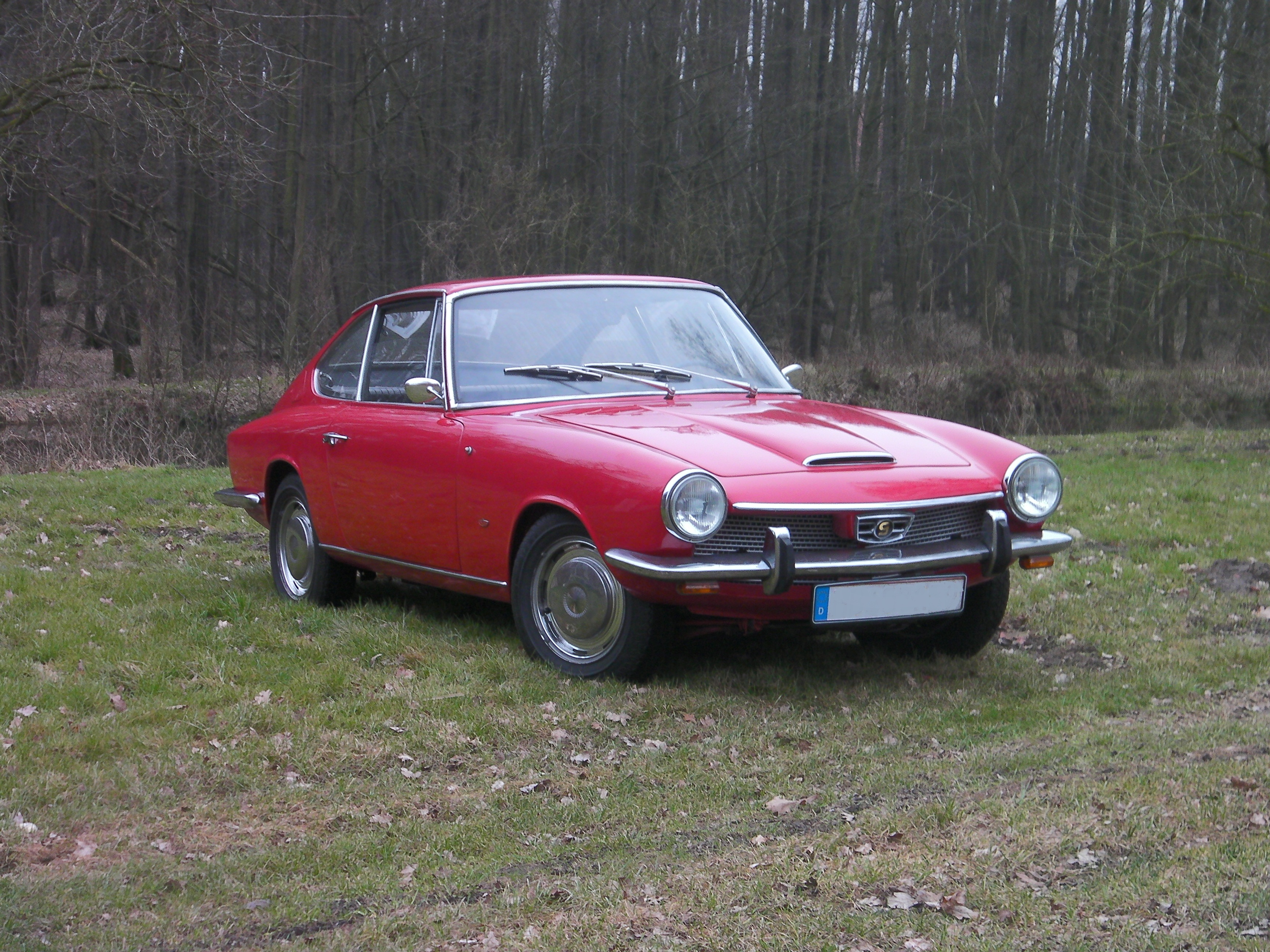 An Glas 1700 GT Export Version